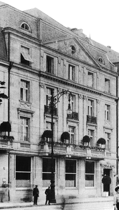 Alleestraße Nr. 36 erbaute und bewohnte Hermann Joseph Friedrich Beuth